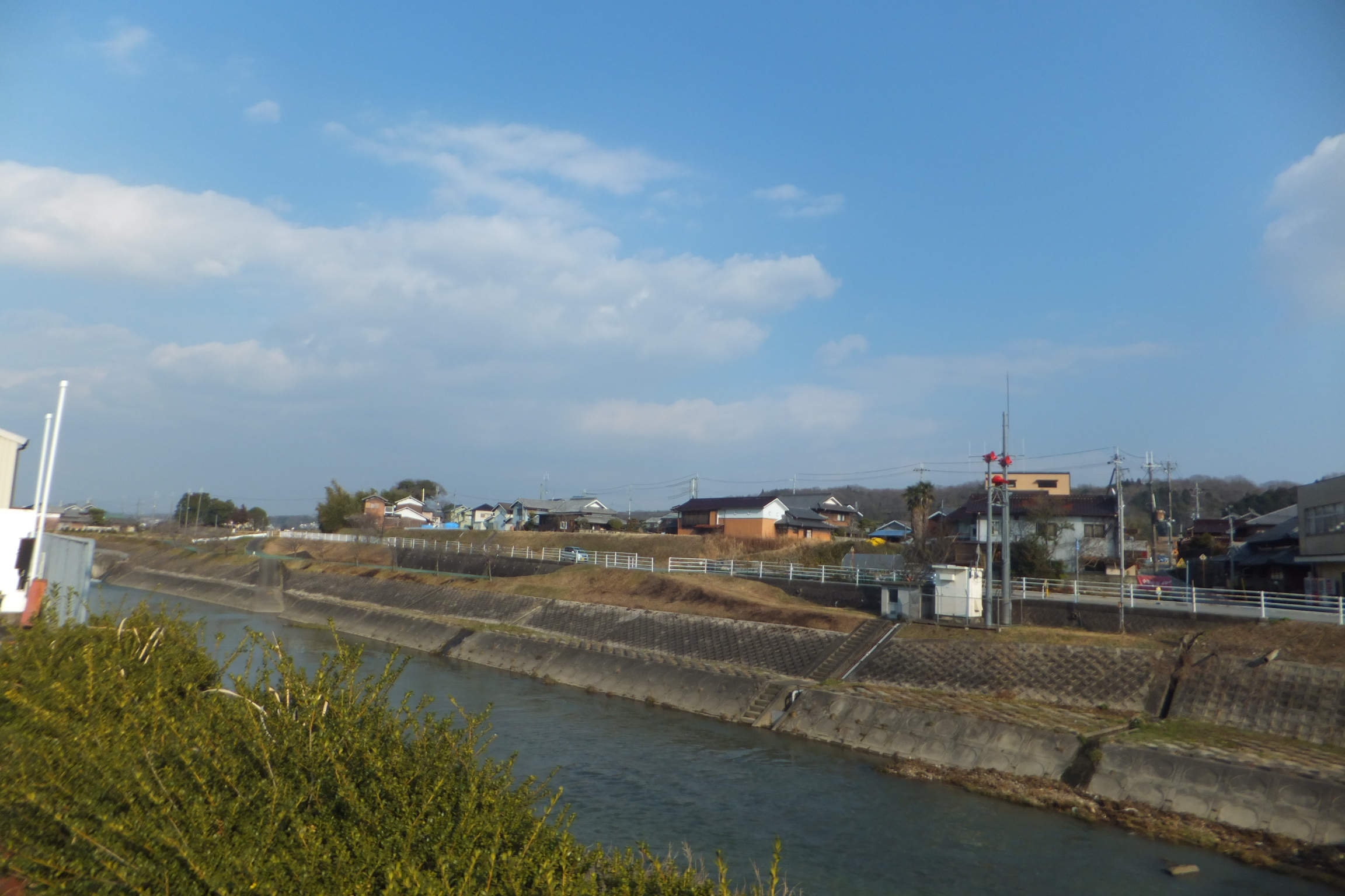 兵庫県加東市岡本 東条川